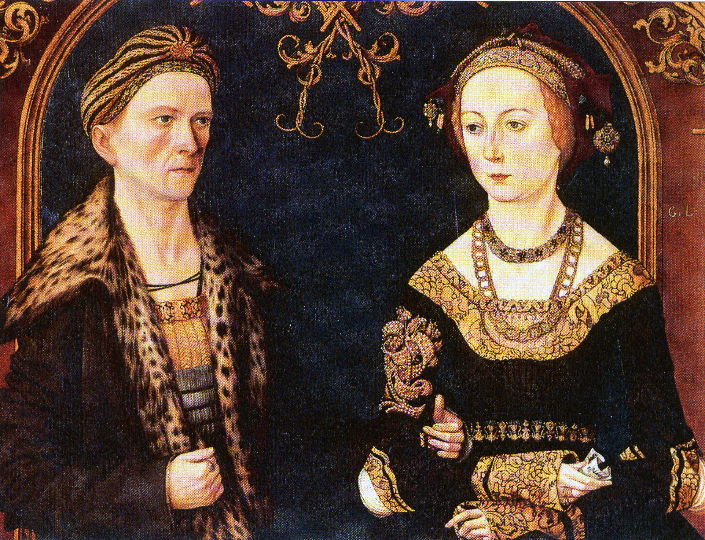 Hochzeitsbildnis der Eheleute Jakob Fugger und Sibylla Artzt. Kurt Löcher: Studien zur oberdeutschen Bildnismalerei des 16. Jahrhunderts. In: Jahrbuch der Staatlichen Kunstsammlungen in Baden-Württemberg. 4, Deutscher Kunstverlag, Berlin/München 1967, S. 31–84., S. 38–41. schreibt das Doppelbildnis Hans Burgkmair zu. Dem schließt sich Frank Jakupski: Der Maler Hans Burgkmair d. Ä. 1984 (Dissertation Bochum)., S. 7 (Seitenzählung oben) an. Ernst Buchner hatte es 1928 dessen Vater Thoman Burgkmair zugeschrieben. Aufbewahrungsort: London, The Schroder Collection (siehe Ausst.Kat. "Dürer-Cranach-Holbein", Wien Kunsthistorisches Museum 2011, S. 76)